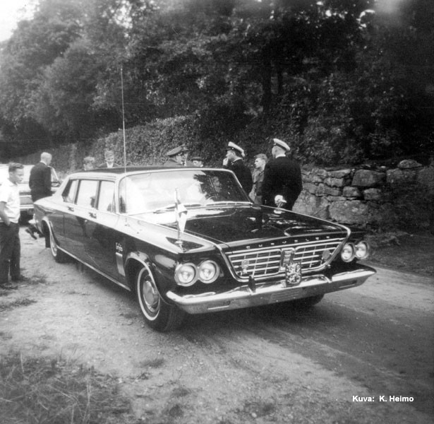 Halikon raivaajapatsas paljastettiin 25.8.1963 kirkonmäellä. Kutsuvieraina paikalla oli mm. tasavallan presidentti Urho Kekkonen ja rouva Sylvi Kekkonen. Patsaan on tehnyt kuvanveistäjä Kalervo Kallio, presidentti Kyösti Kallion poika.